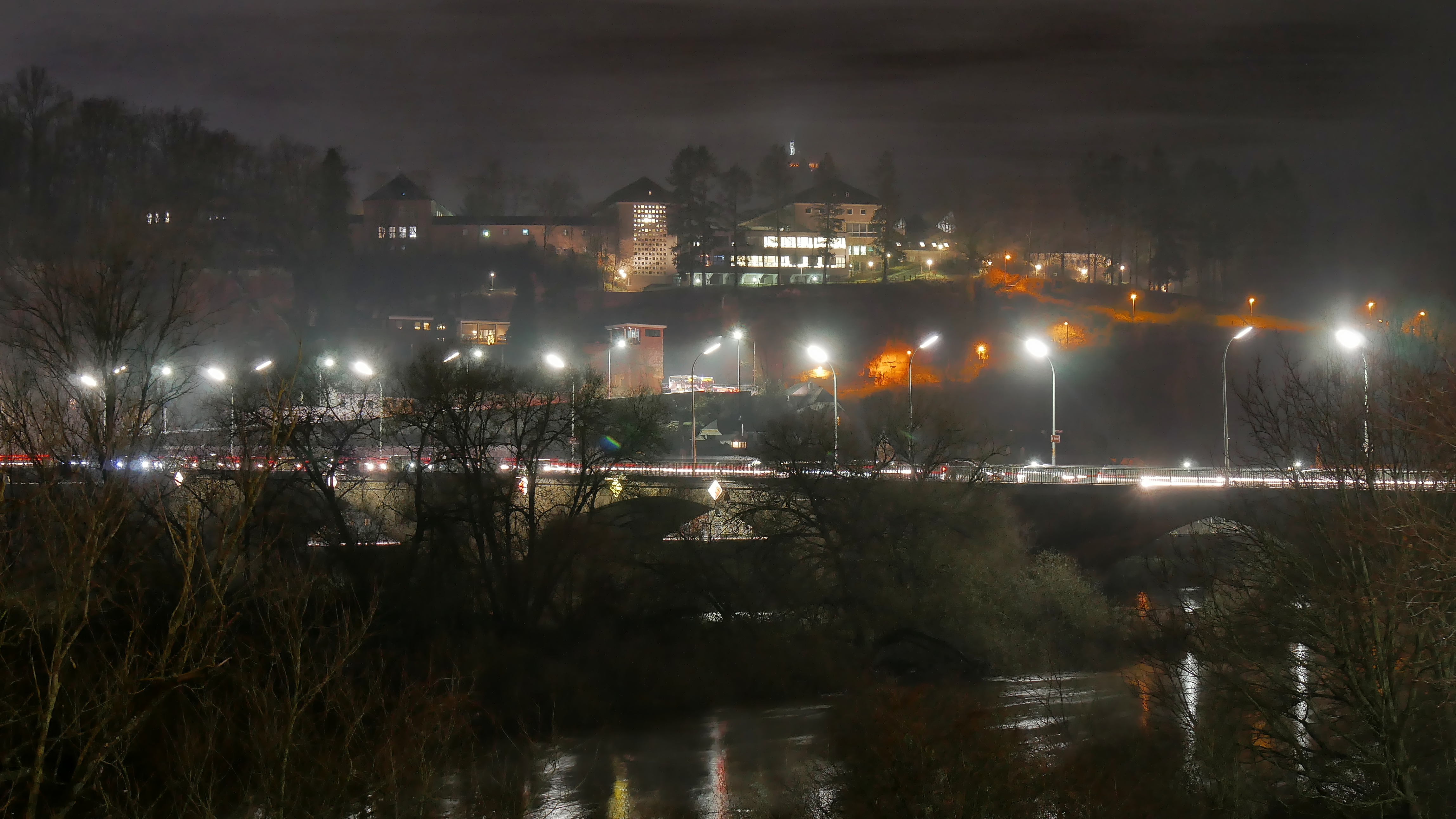 Trier (Germany): Kaiser Wilhem Brücke über die Mosel, darüber der Hauptcampus (Campus Schneidershof) der Hochschule Trier (ganz links 2 Finger und die Mauern der Nazi-Bauten, der Rest stammt aus den Zeiten der Pädagogischen Hochschule aus den 1959er-Jahren, und ganz oben das Hotel Kockelsberg (Gründerzeitbau)